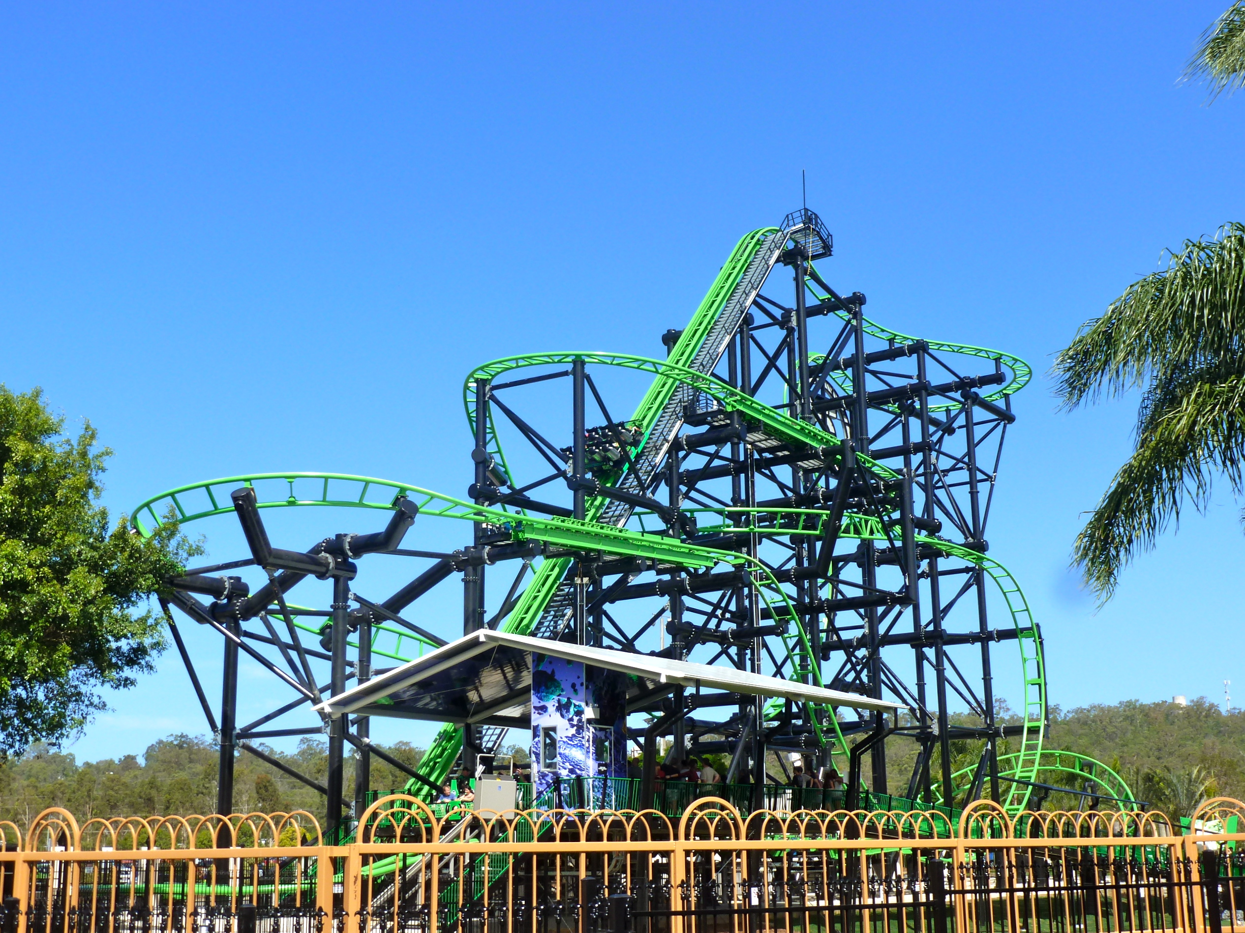 Movieworld